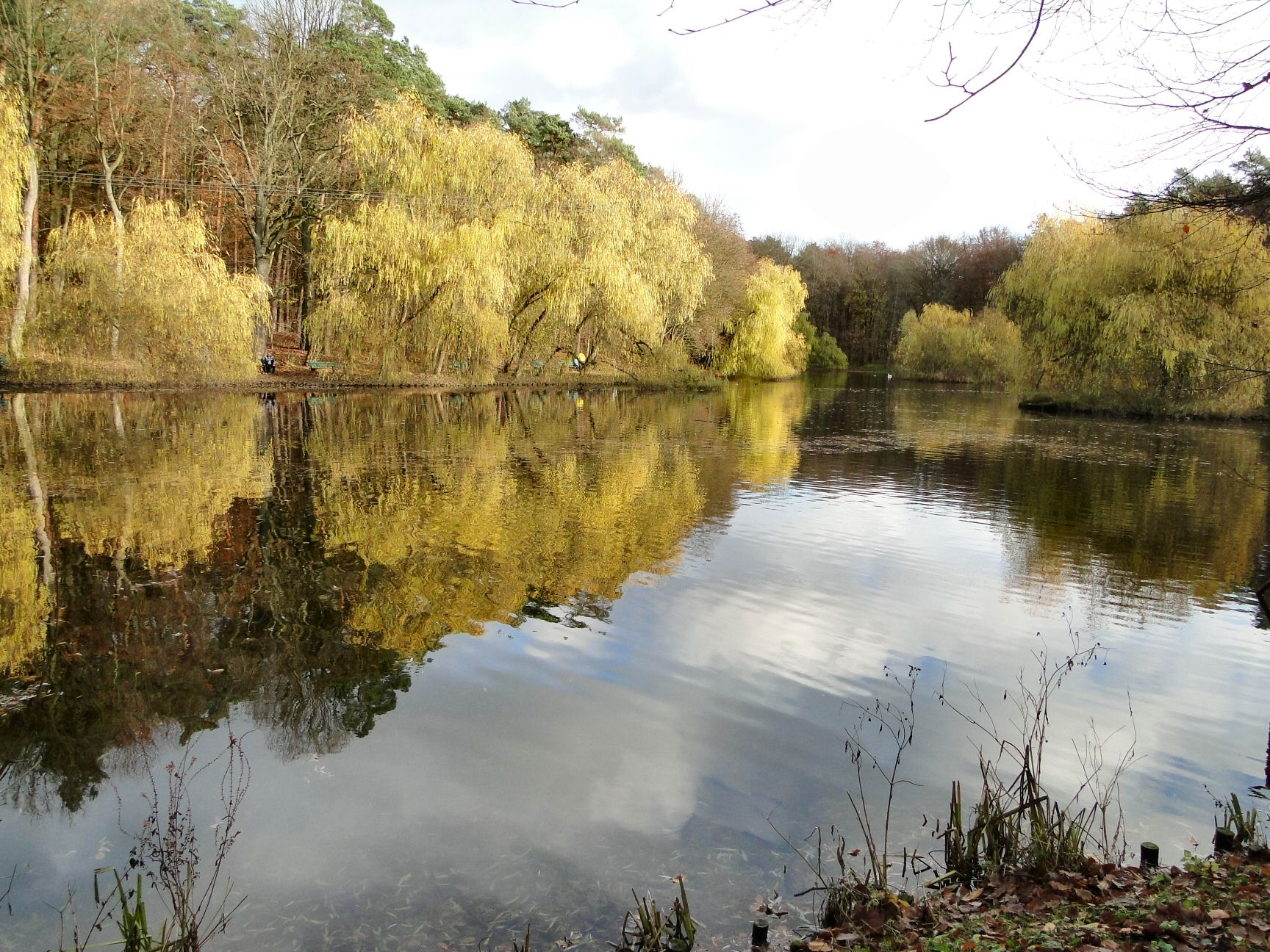 Staw Wędkarski na osiedlu Głębokie w Szczecinie